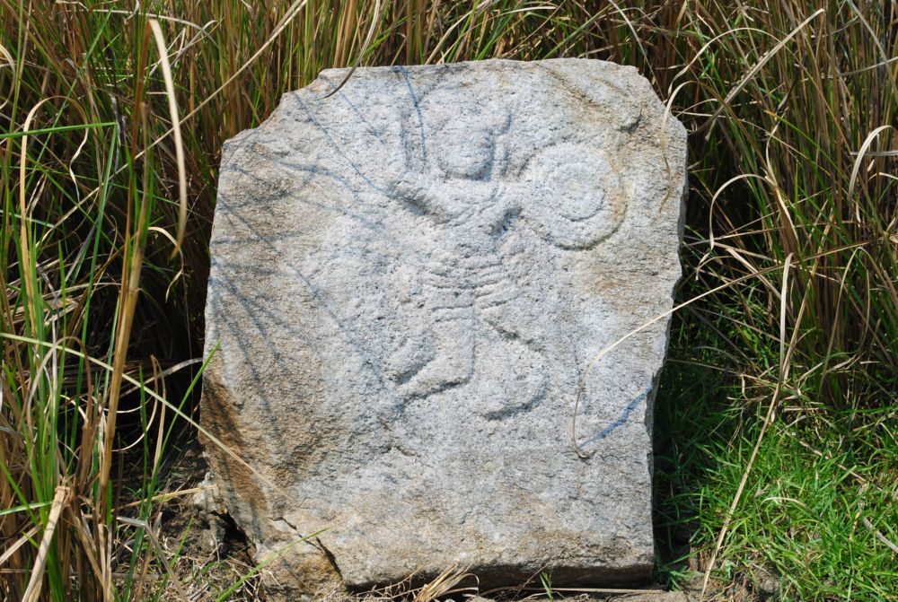 முருகமங்கலம் ஏரியில் உள்ள ஒரு வீரனின் நடுகல்